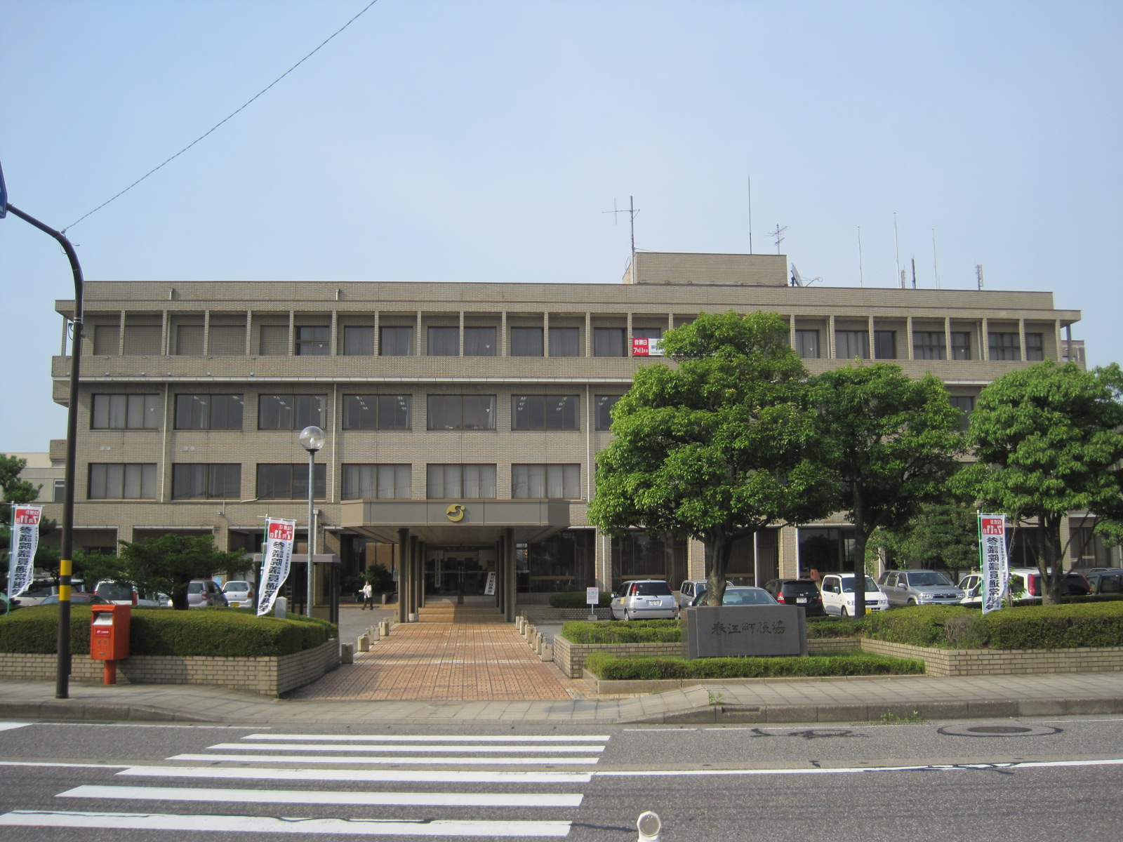 坂井市役所春江総合支所・嶺北消防組合事務局（福井県坂井市春江町）